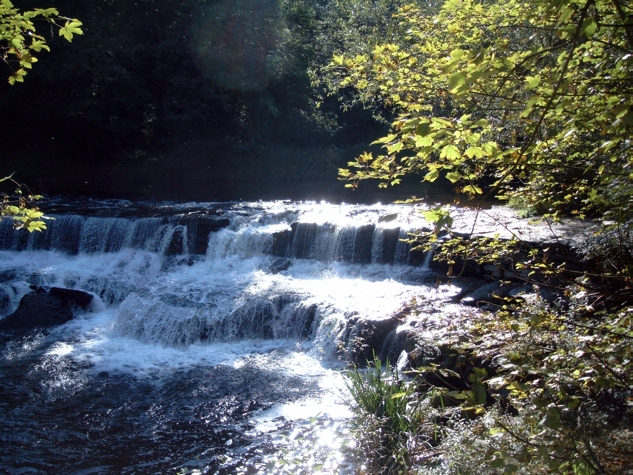 Chrysopras-Wehr (ugs. „Wasserfall“) im Schwarzatal bei „Lösches Hall“, Bad Blankenburg